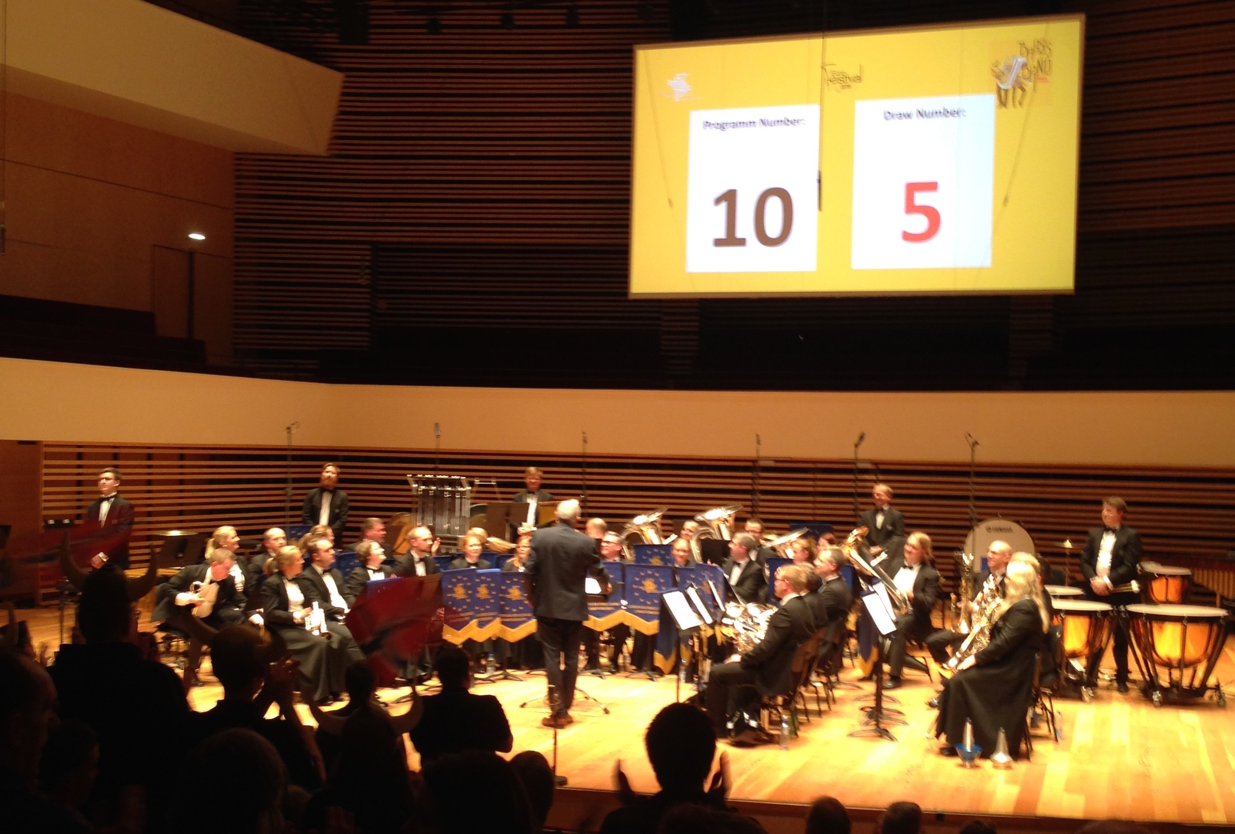 Stavanger Brass Band